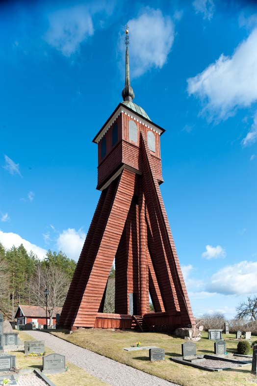 Klockstapeln från nordväst. Kyrkan är en av landets äldsta och märkligaste träkyrkor. Den uppfördes ursprungligen omkring år 1260 av timmer med mycket kraftiga dimensioner och utan skarvar. Motiv: Tidersrums kyrka Nyckelord: Riksintressen Kategori: (01) ExteriörerKlockstapeln från nordväst. Kyrkan är en av landets äldsta och märkligaste träkyrkor. Den uppfördes ursprungligen omkring år 1260 av timmer med mycket kraftiga dimensioner och utan skarvar.